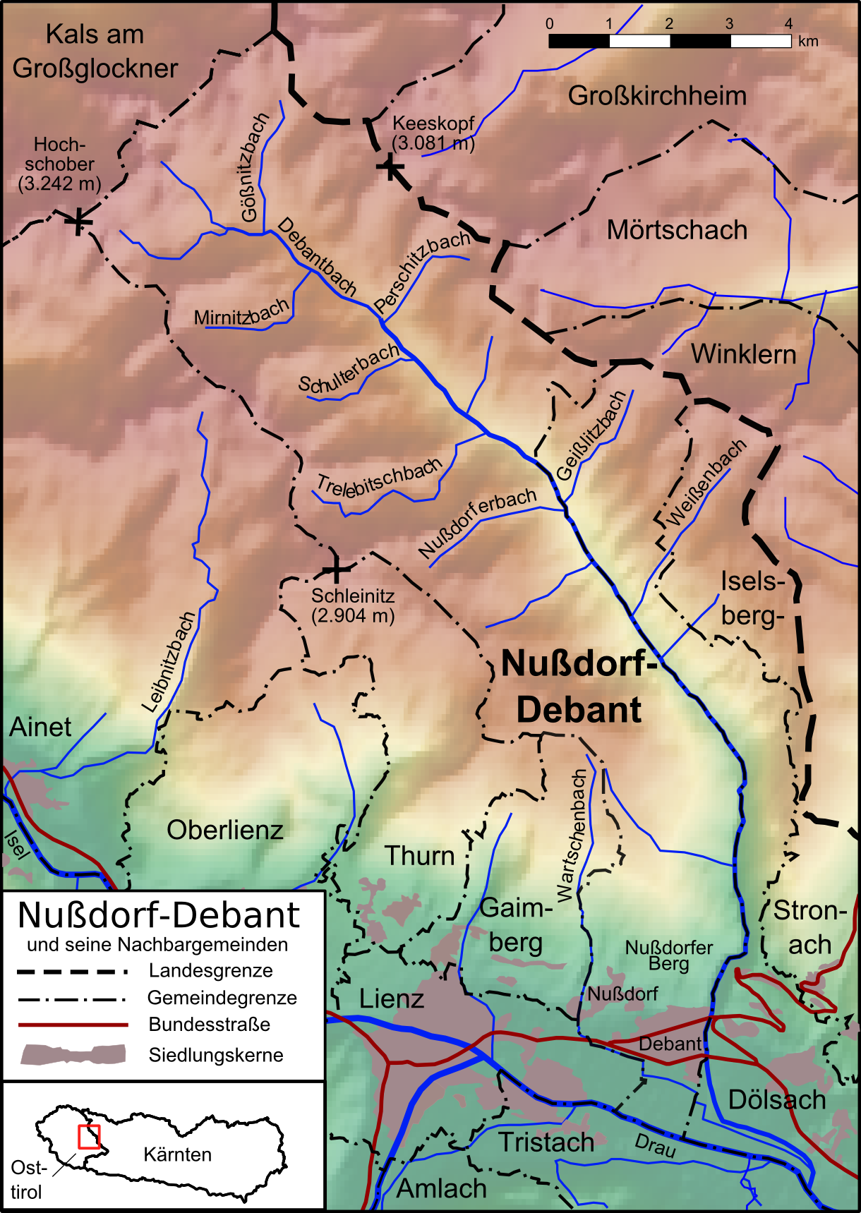 Karte von Nußdorf-Debant